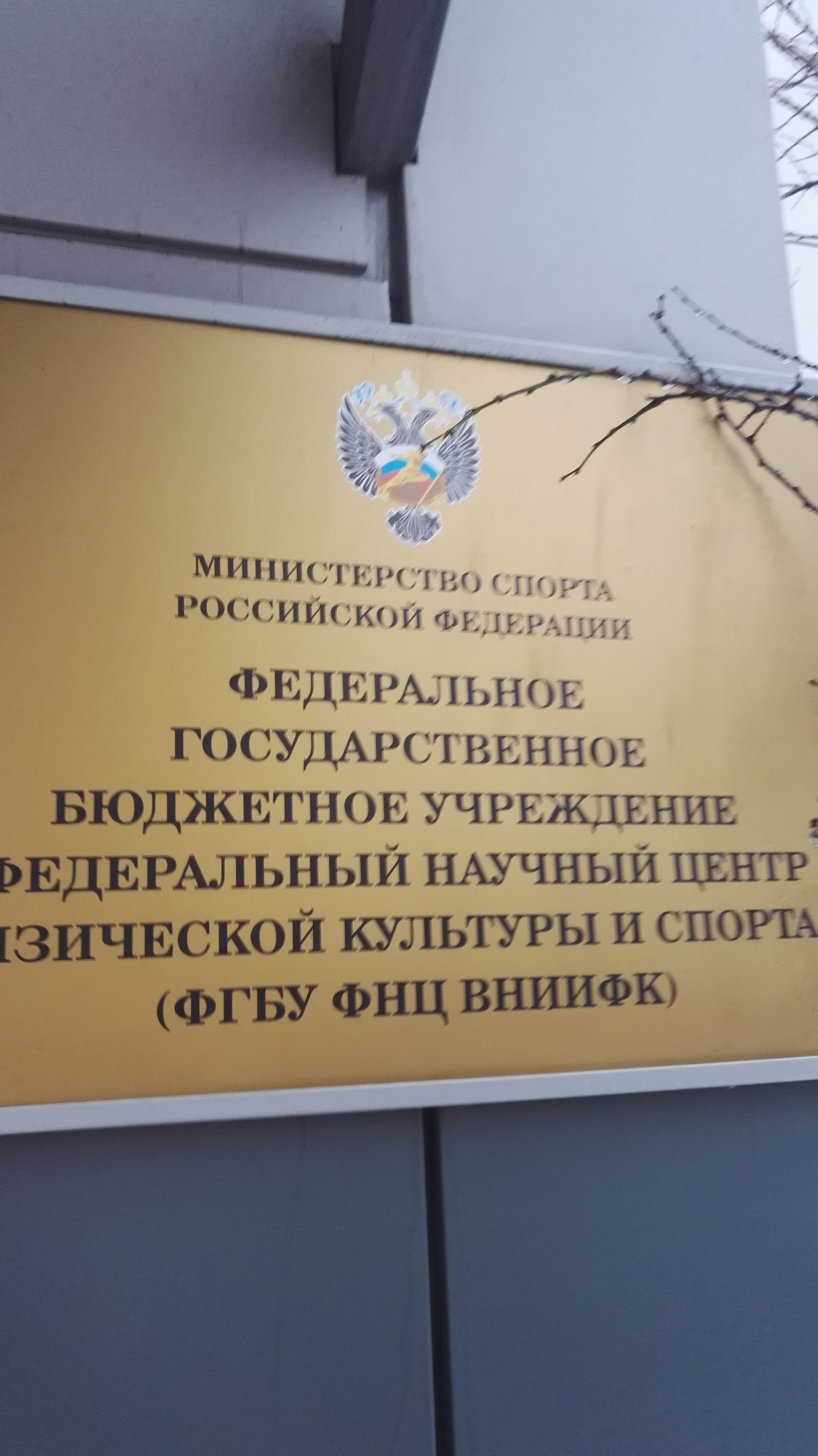 VNIIFK